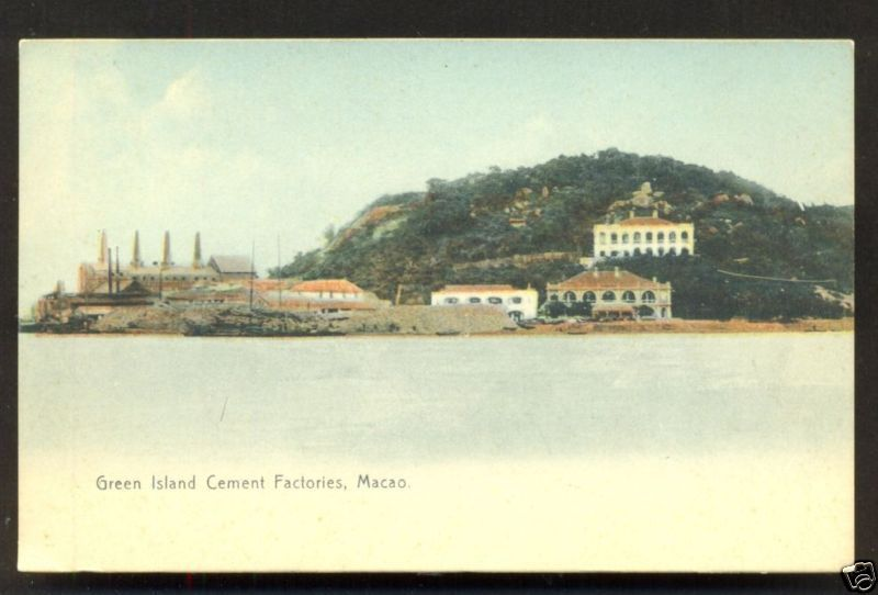 Ilha Verde Macau